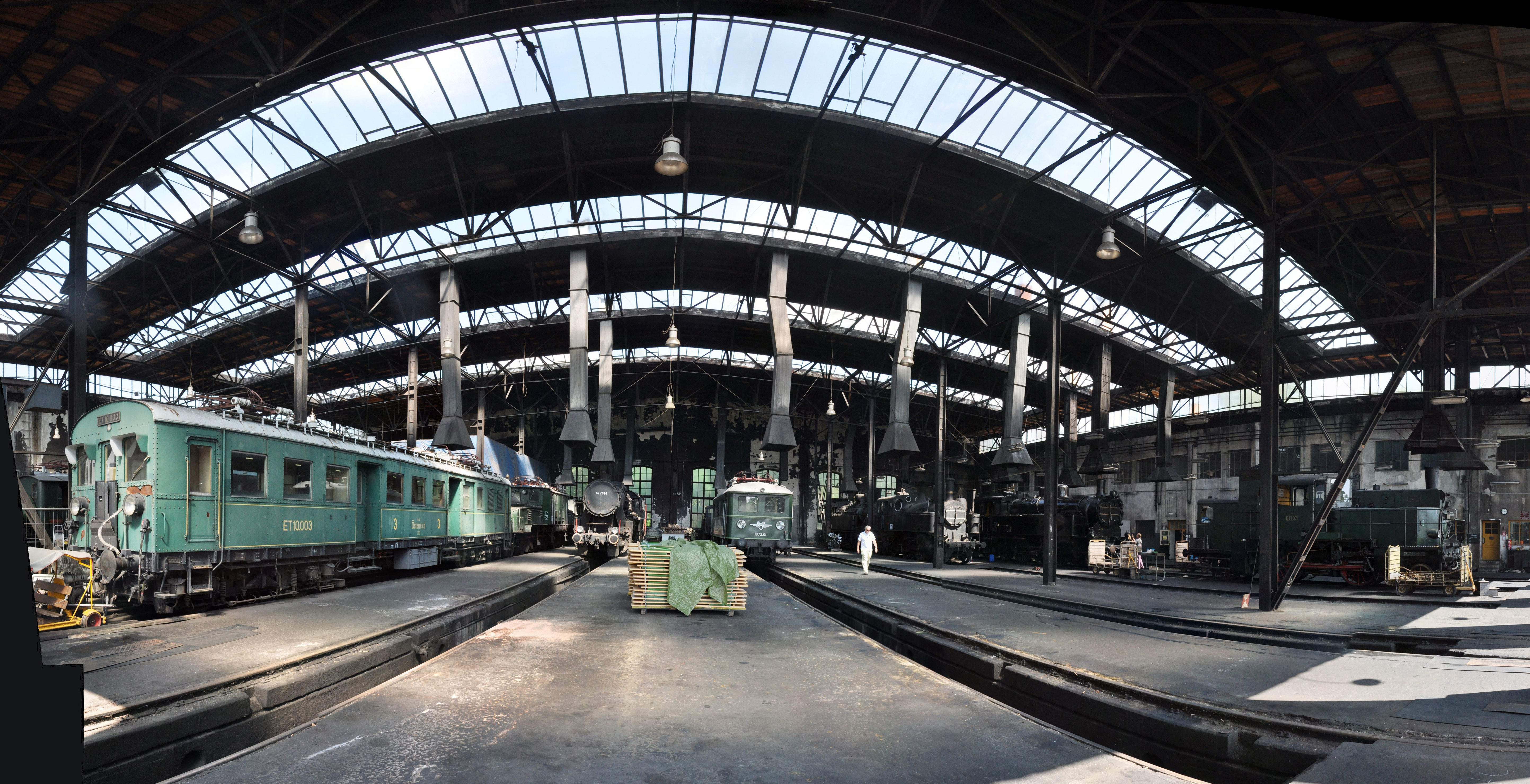 Halle Heizhaus Strasshof